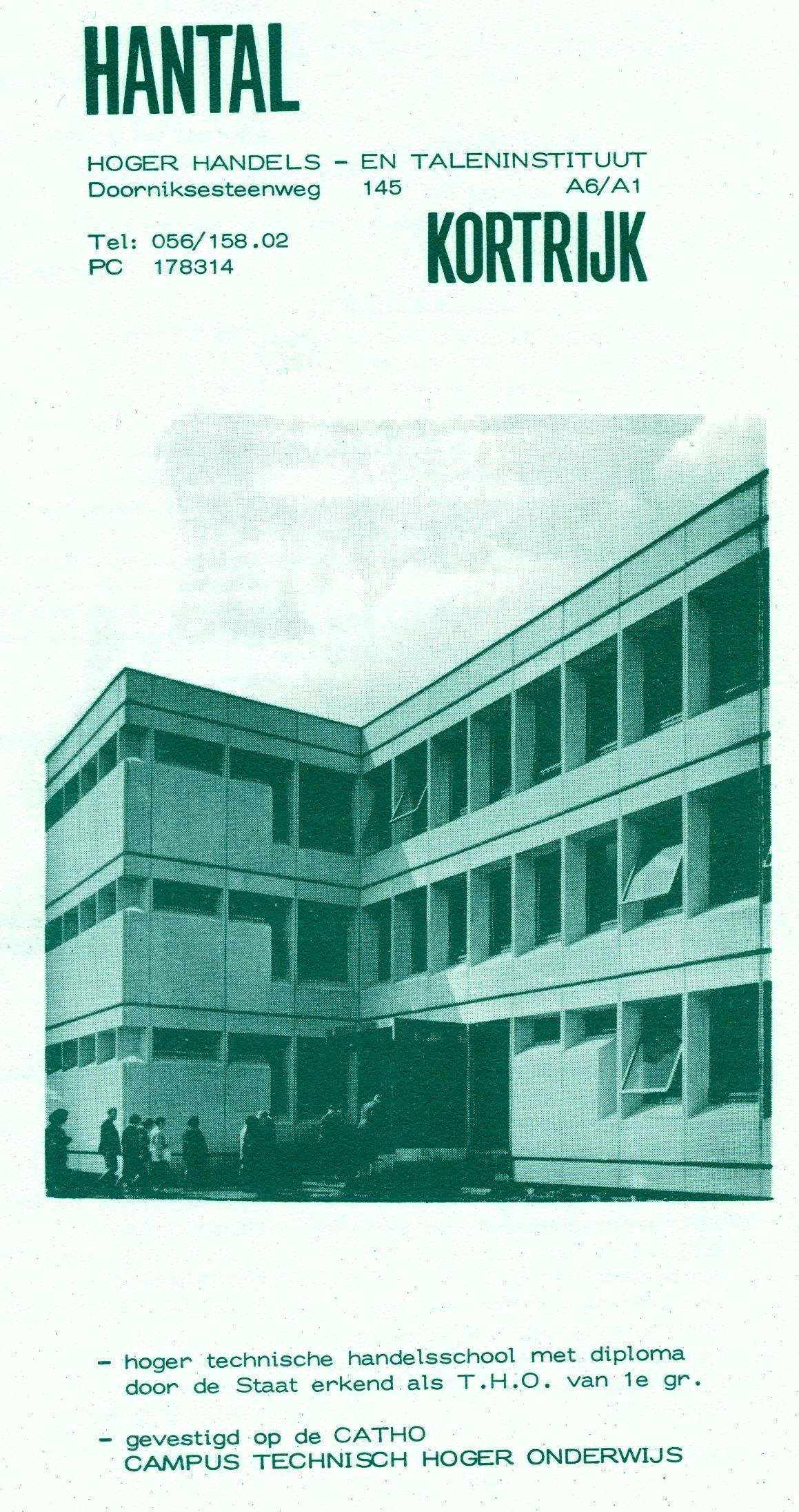 Hantal en Ipsoc delen een tijdlang hetzelfde gebouw.